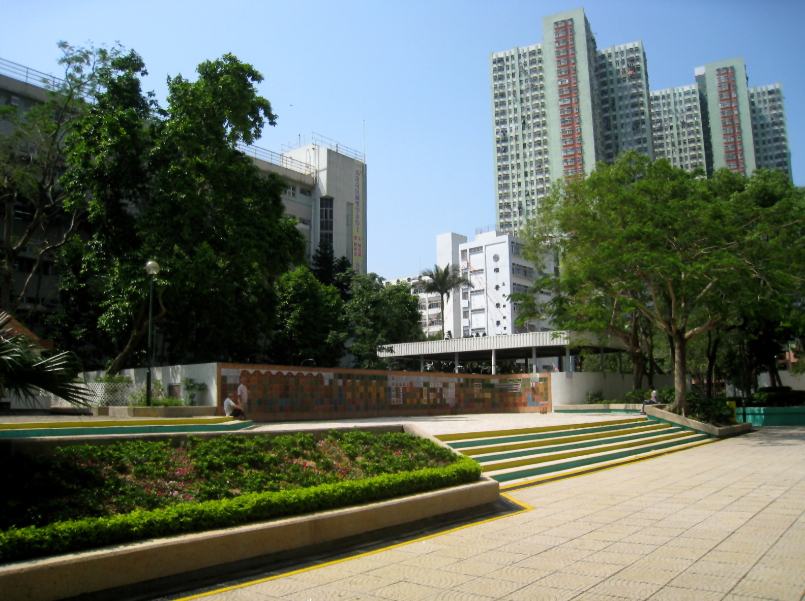 Fu Shin Estate 富善邨